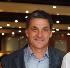 Angel Jiménez decano coiaanpv